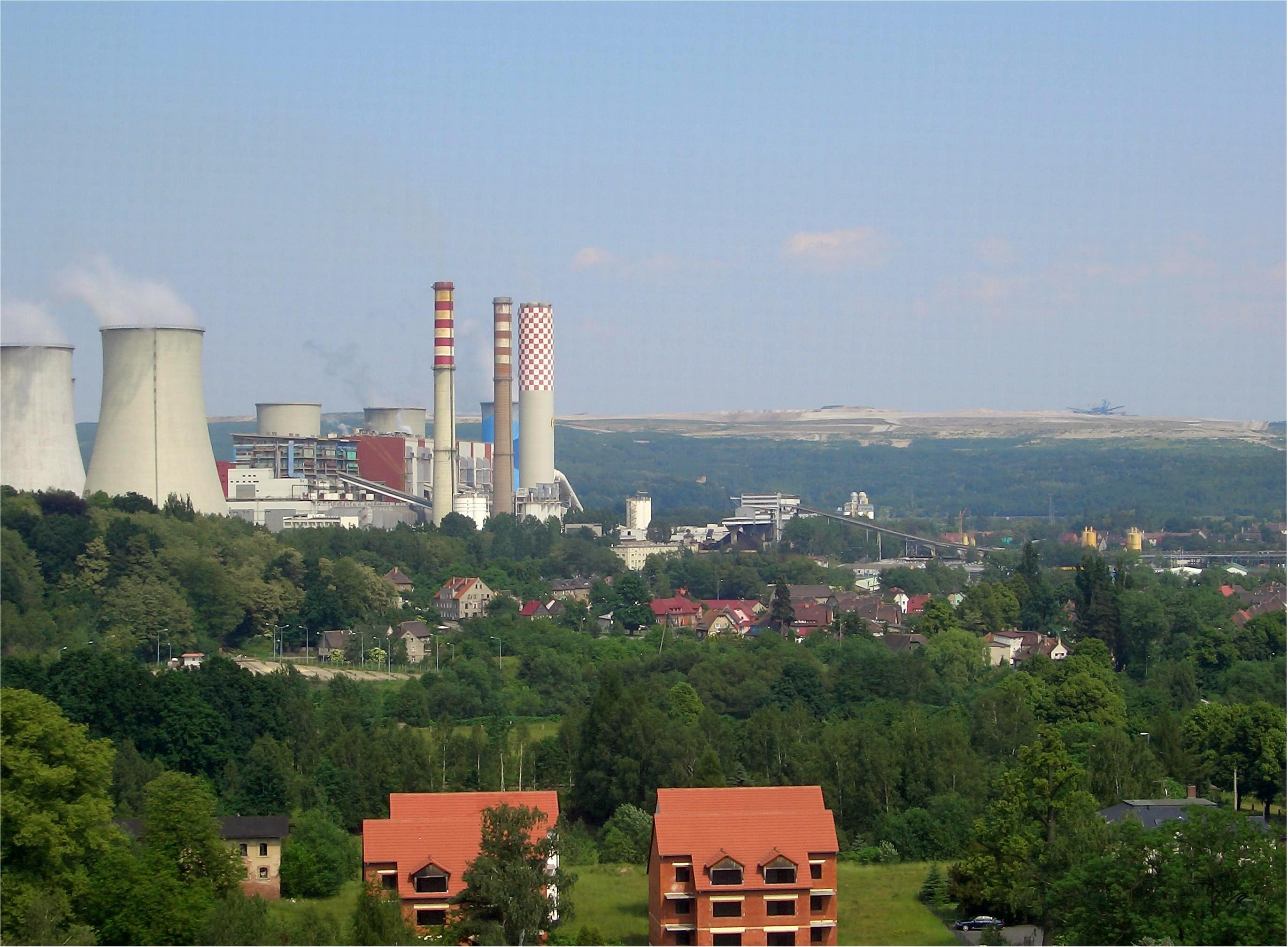 Blick Kirche Dittelsdorf, Sachsen, Deutschland. im Vordergrund Investruinen auf dem Grundstück der ehemaligen Weberei J. B. Herrmann in Hirschfelde (Zittau), Sachsen, Deutschland in der Mitte sind die zahlreichen Häuser der früheren zu Hirschfelde gehörigen Ortschaft Lehde (Trzciniec Dolny, Bogatynia, Niederschlesien, Polen sichtbar dominierend im Hintergrund das 1962 in Betrieb gegangene Kraftwerk Turów im Ortsteil Turoszów (Türchau) der Gemeinde Bogatynia, Niederschlesien, Polen hinten rechts unübersehbar die Abraumhalde des Tagebaus Turów